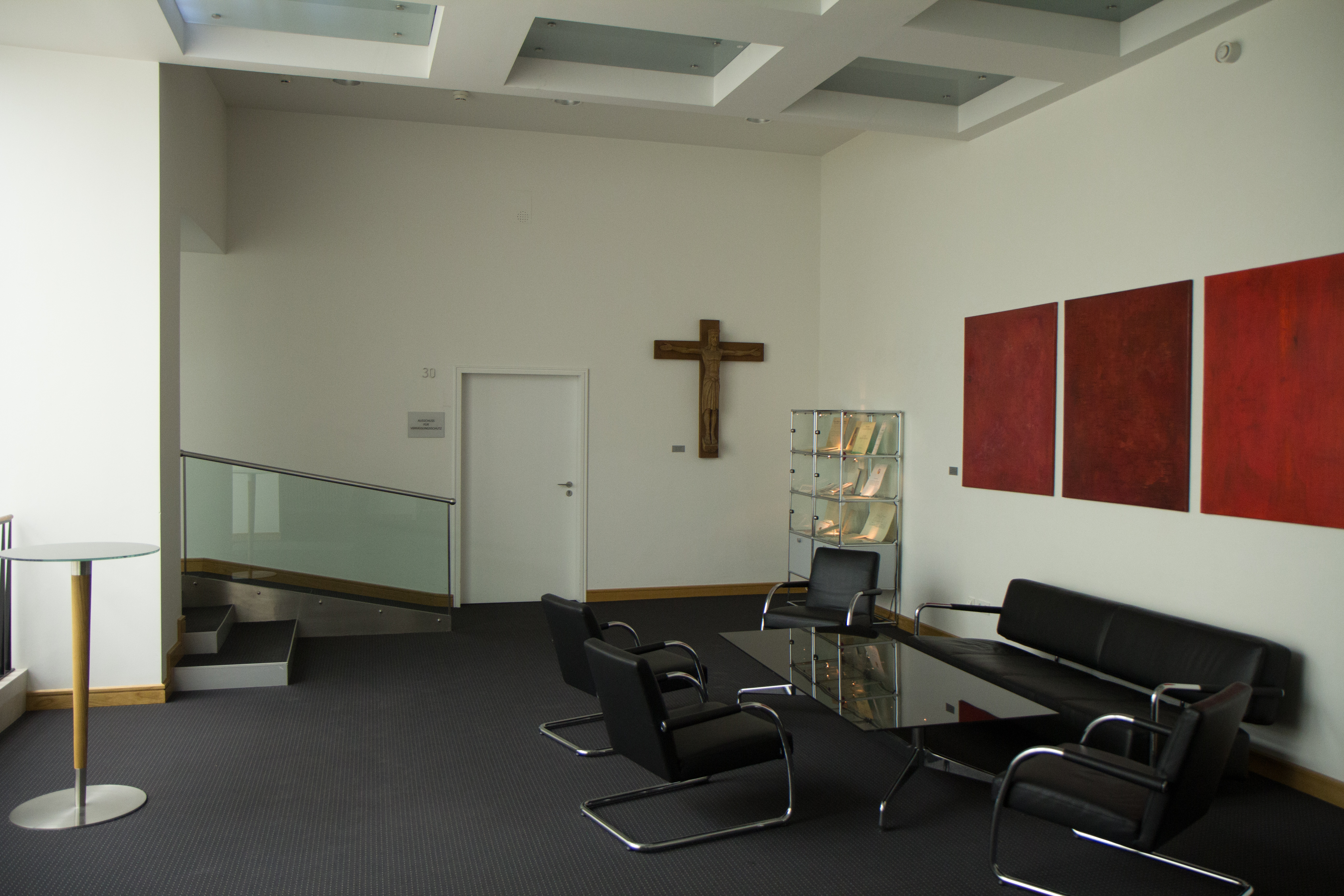 Vorraum zum Plenarsaal im Landtag des Saarlandes